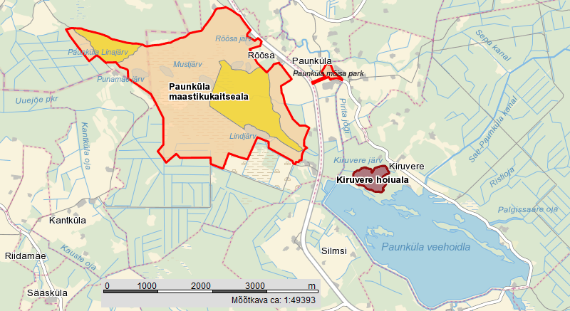 Paunküla MKA kaart. Põhineb Maa-ameti kaardil.